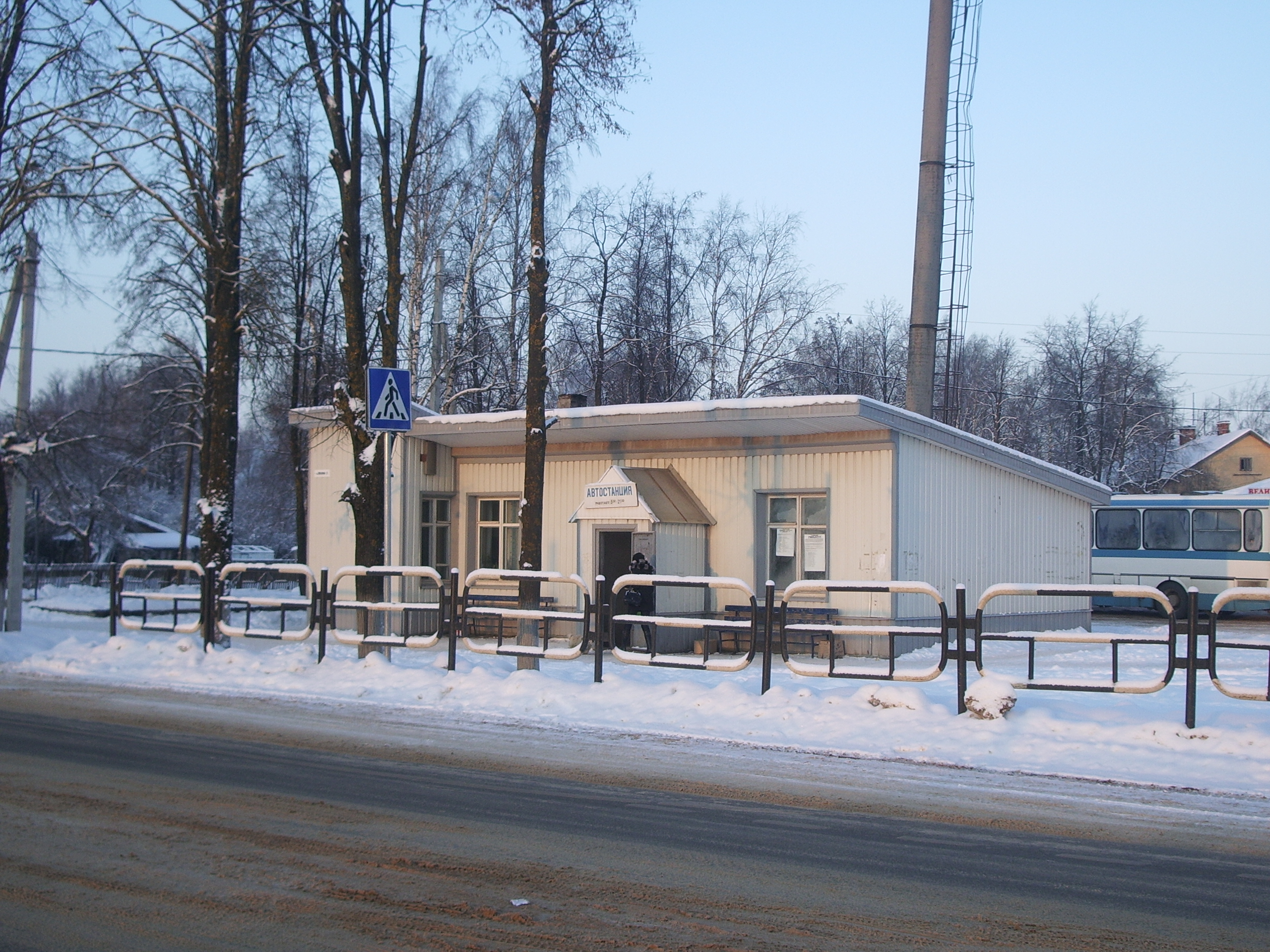 Автостанцая в Шимске (Новгородская область)